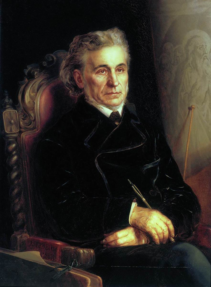 Портрет художника Федора Антоновича Бруни Направление: Академизм Местонахождение:Государственная Третьяковская галерея, Москва Материалы: холст, масло Размеры: 105,4 х 78,5 см